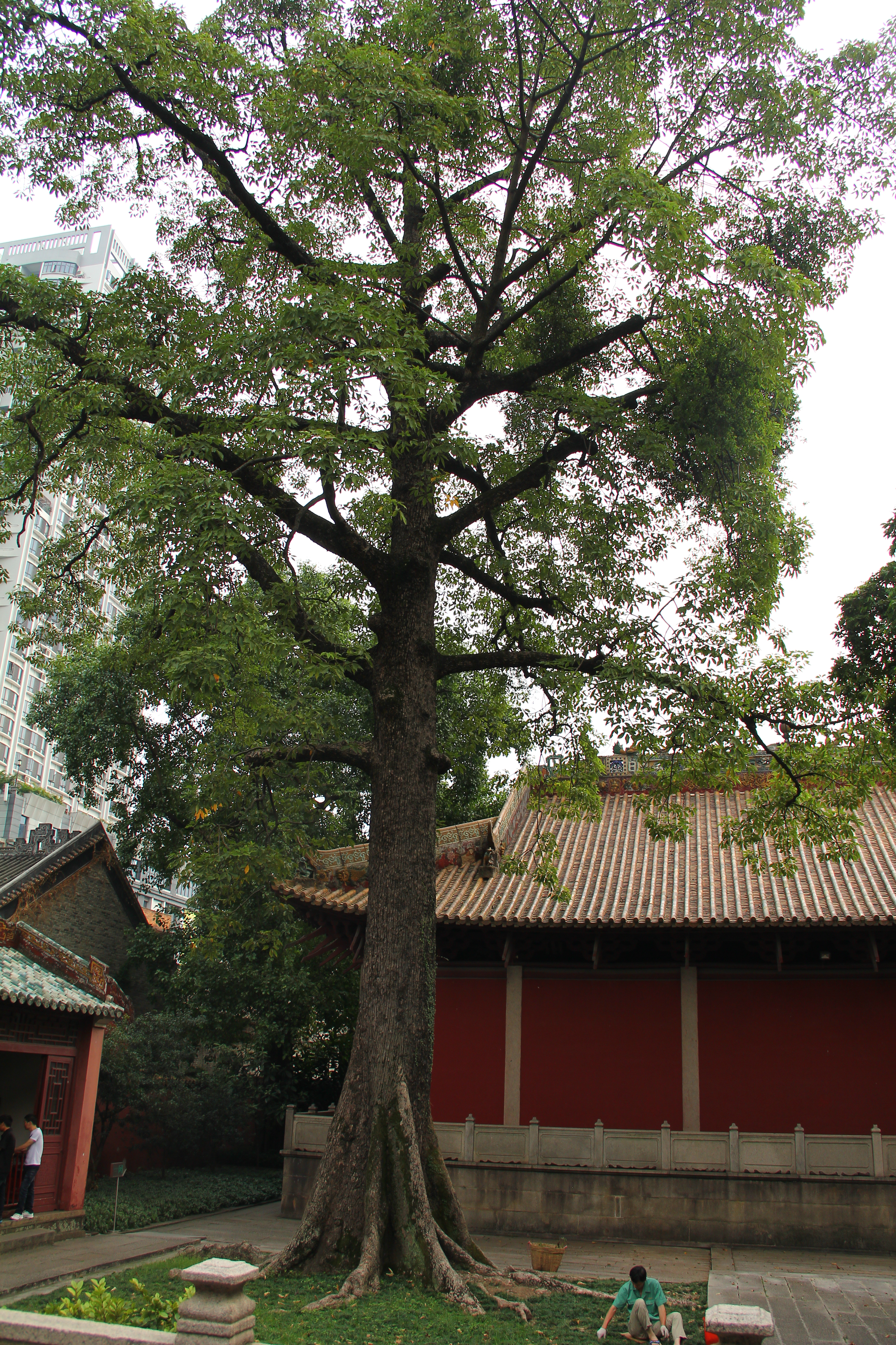 農講所崇聖殿前的木棉樹。